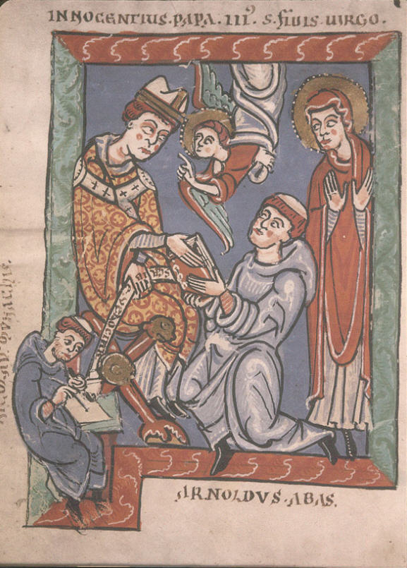 Inocenc III. předává knihu Arnoldovi ze Citeaux